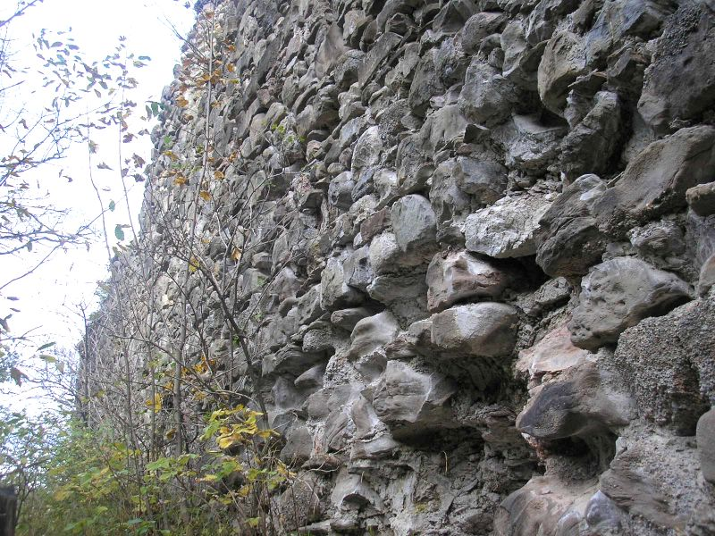 Burg Nesselburg (Nesselwang, Landkreis Ostallgäu, Bayerisch-Schwaben). Schildmauer von Südosten. Eigene Aufnahme, Okt. 2006 / Nesselburg castle above Nesselwang near Kempten (Bavaria, Germany). Shield wall, seen from the southwest. Own photo, Oct. 2006